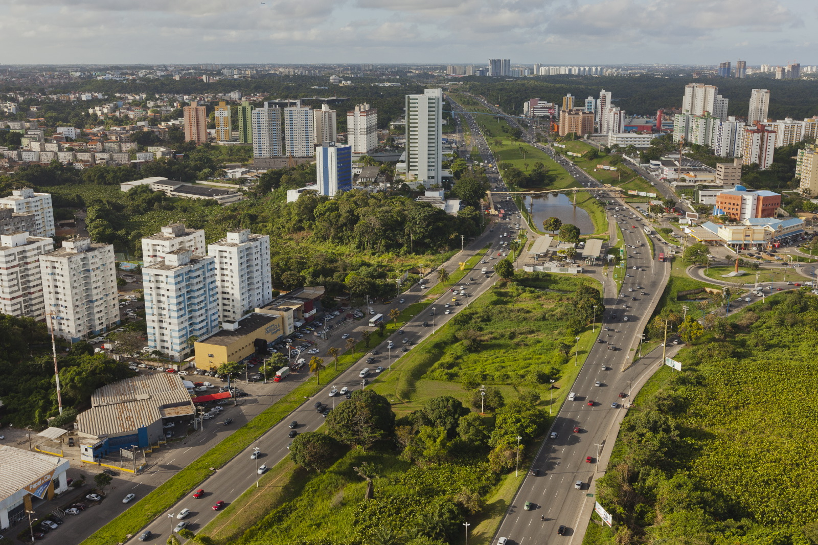 Vista aérea da Avenida Paralela cortando o Imbuí, em Salvador.